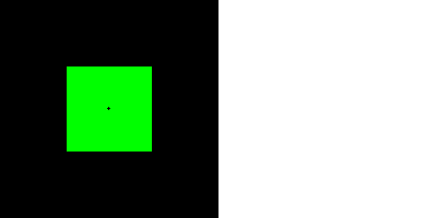 Ein Nachbild entsteht, wenn man zunächst auf das grüne Quadrat starrt und dann auf die weiße Fläche